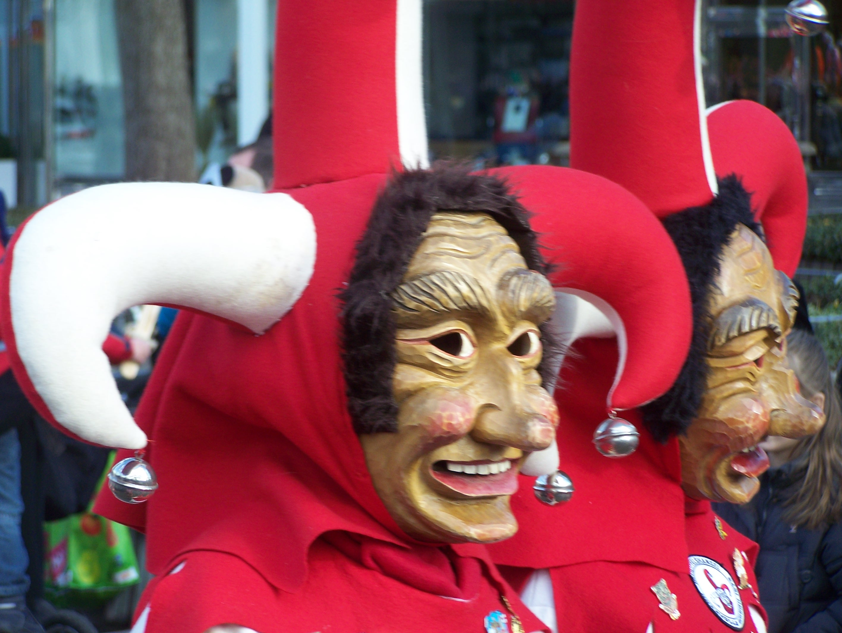 Narrensprung in Freiburg im Breisgau, Dreizipfelhansele der Narhalla Achern